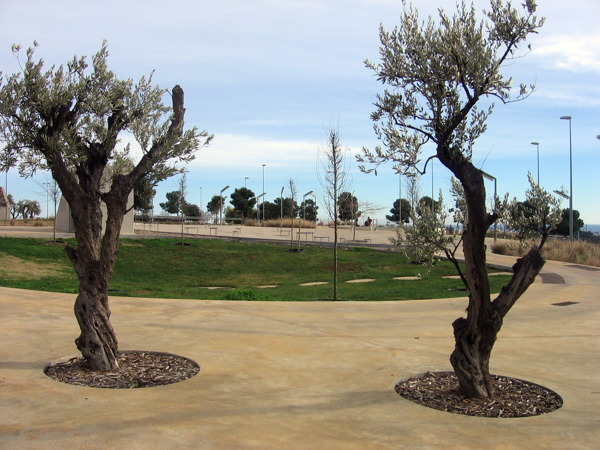 Parque de Xavier Montsalvatge.